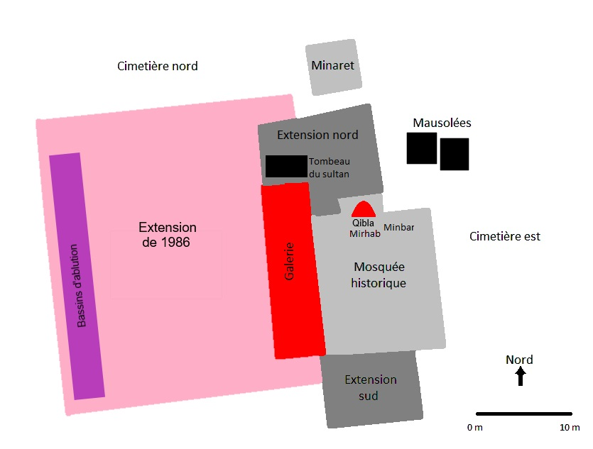 Schéma de la mosquée de Tsingoni (Mayotte), avec les extensions successives et les mausolées shiraziens. Document réalisé à partir d'un schéma de la Direction des affaires culturelles de Mayotte présent dans l'exposition à l'intérieur du musée (2017).